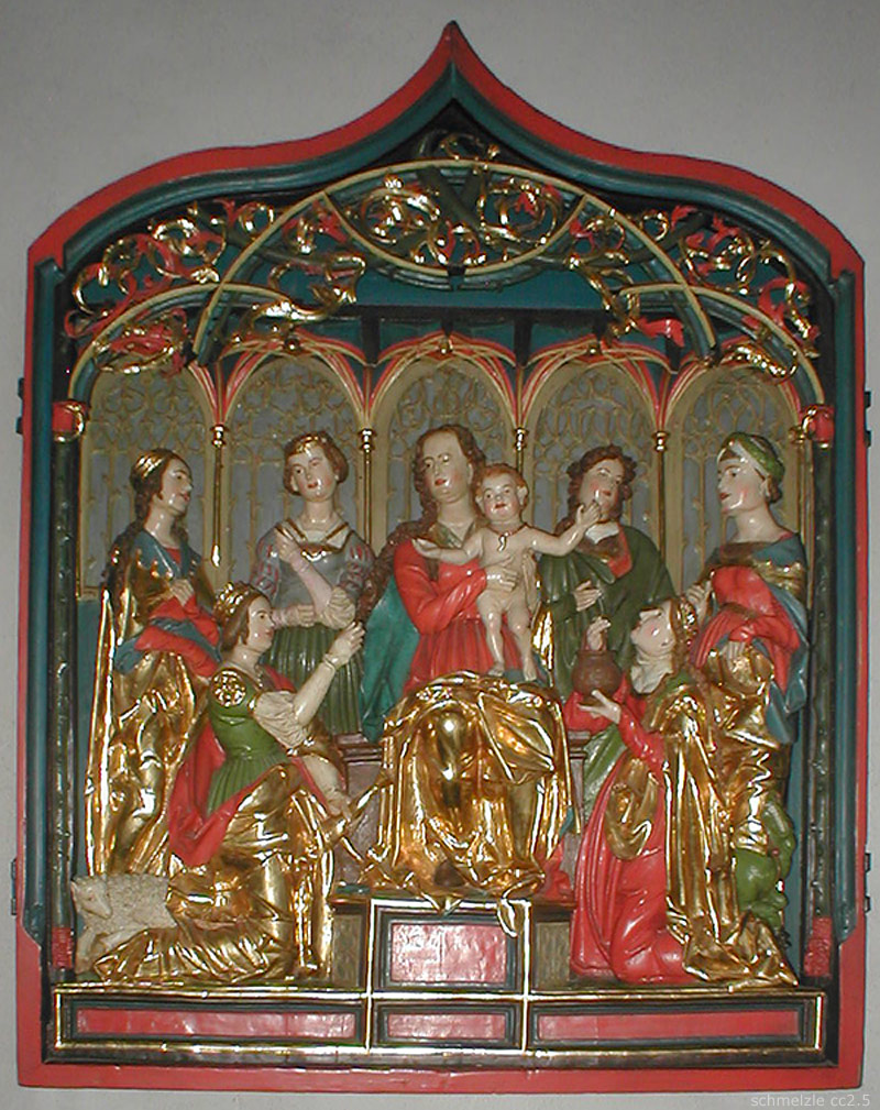 Marienaltärchen in der Pfarrkirche St. Michael in Billigheim (Baden)